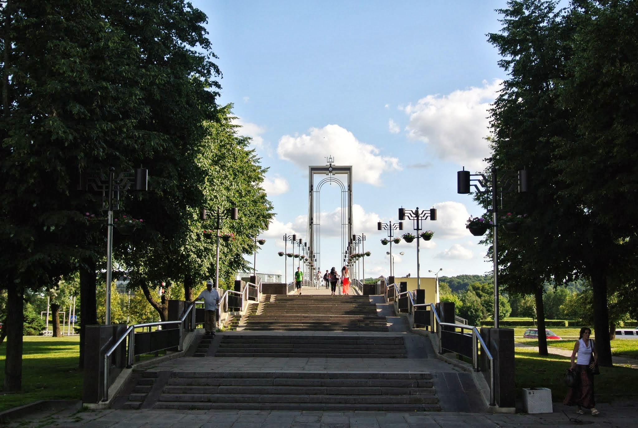 Centras, Kaunas, Lithuania